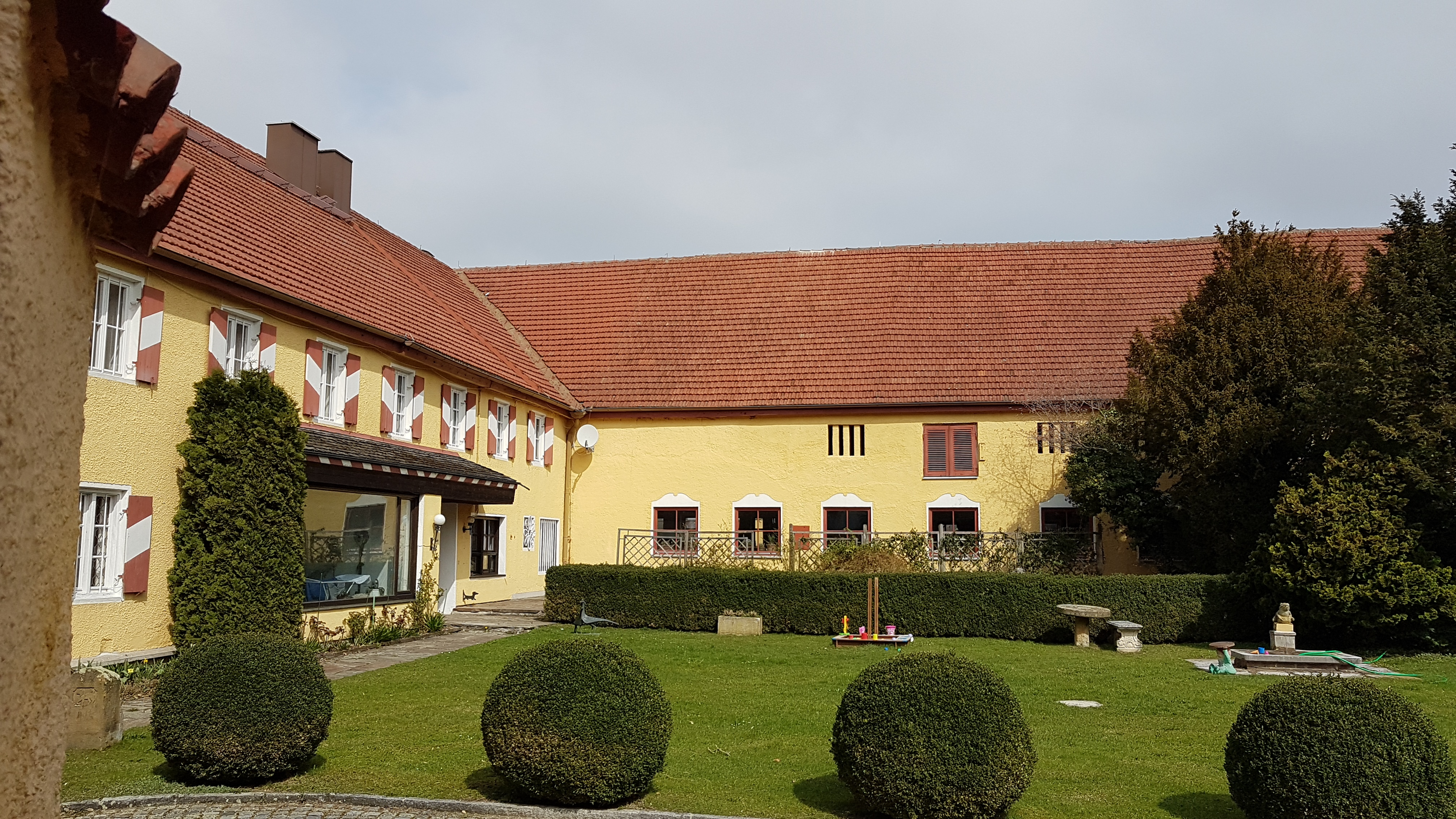 Wagelsried (Alling), Agathenhof - ein herrschaftlicher Gutshof.